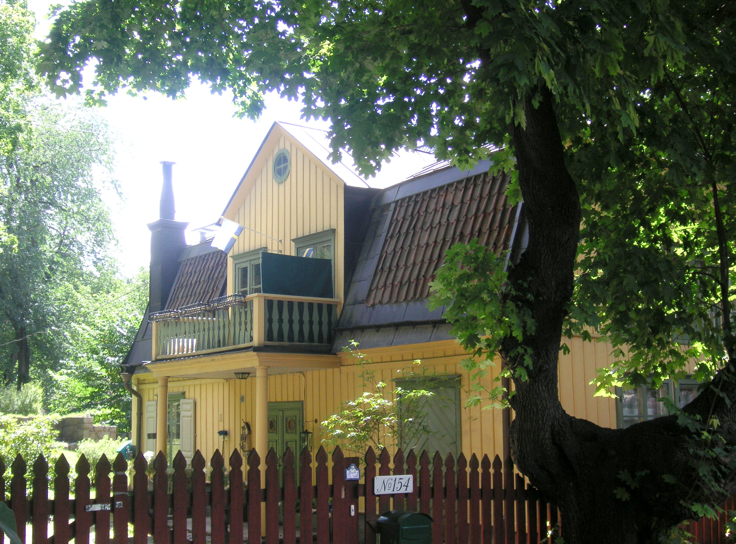 Cerderdals malmgård i Vanadisparken i Stockholm